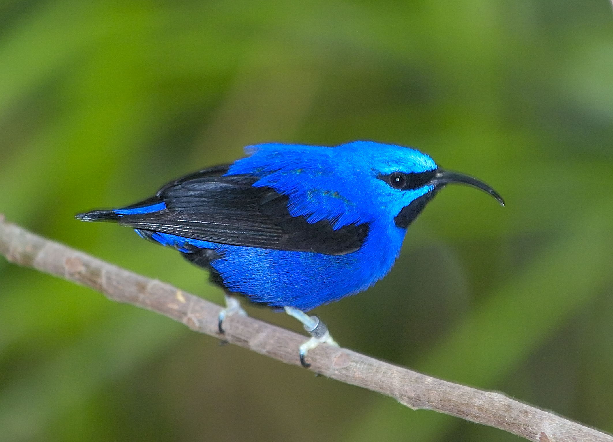 Purpurnaschvogel (Cyanerpes caeruleus) im Tiergarten Schönbrunn, Wien, Österreich